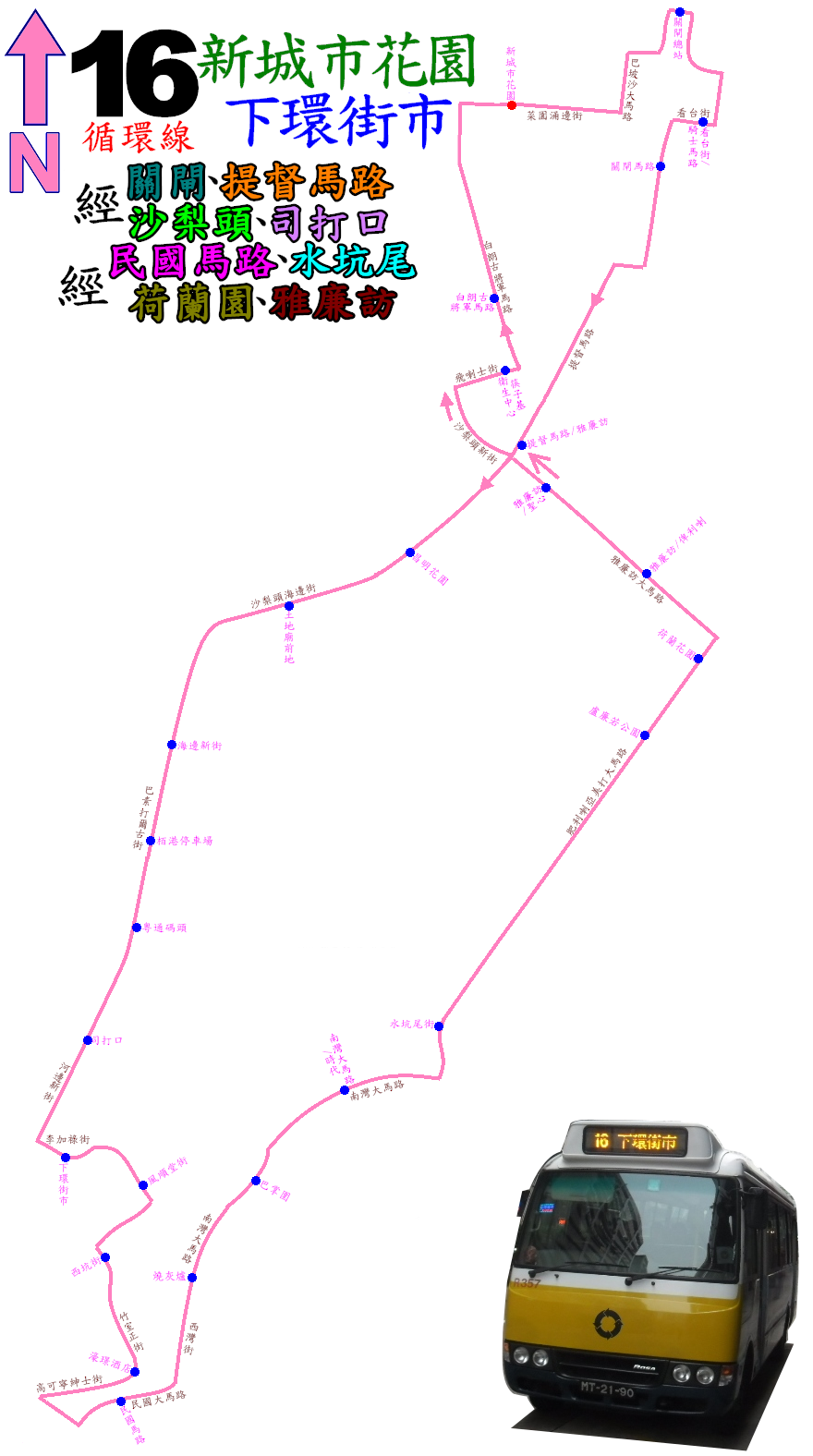 中文（香港）: 澳門巴士16線的走線圖